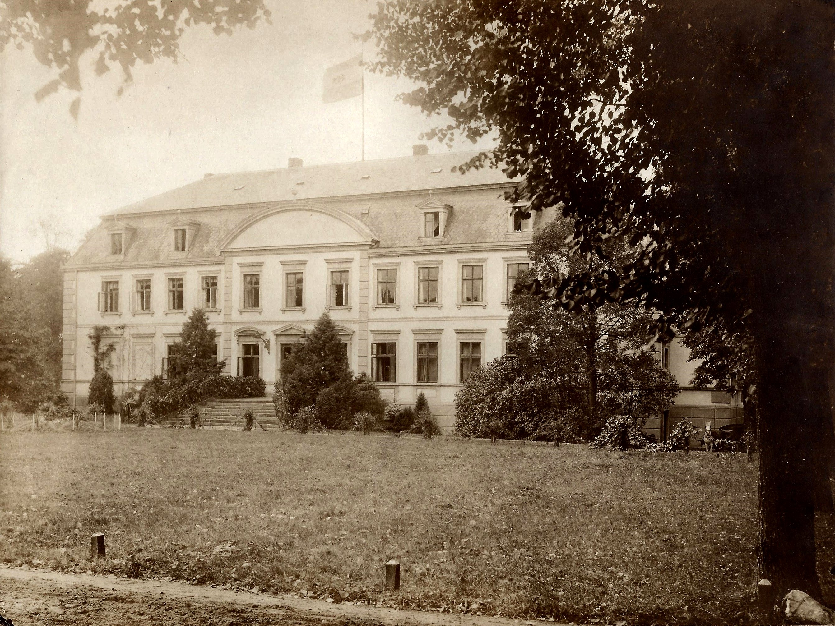 Fotografie des Schlosses Dobbin